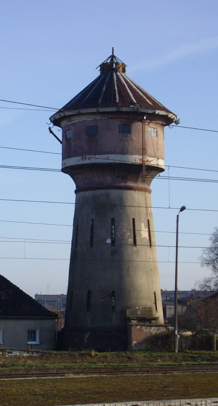 Wieża ciśnień przy stacji kolejowej w Sławnie. Obiekt z lat 1910-1920.